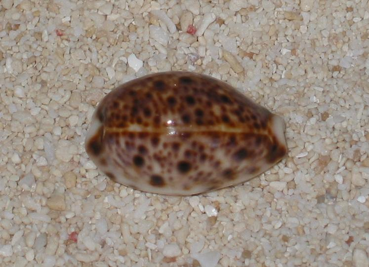 Lyncina lynx